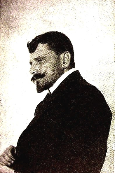 Российский социалист-революционер Пётр Моисеевич Рутенберг (1878-1942)